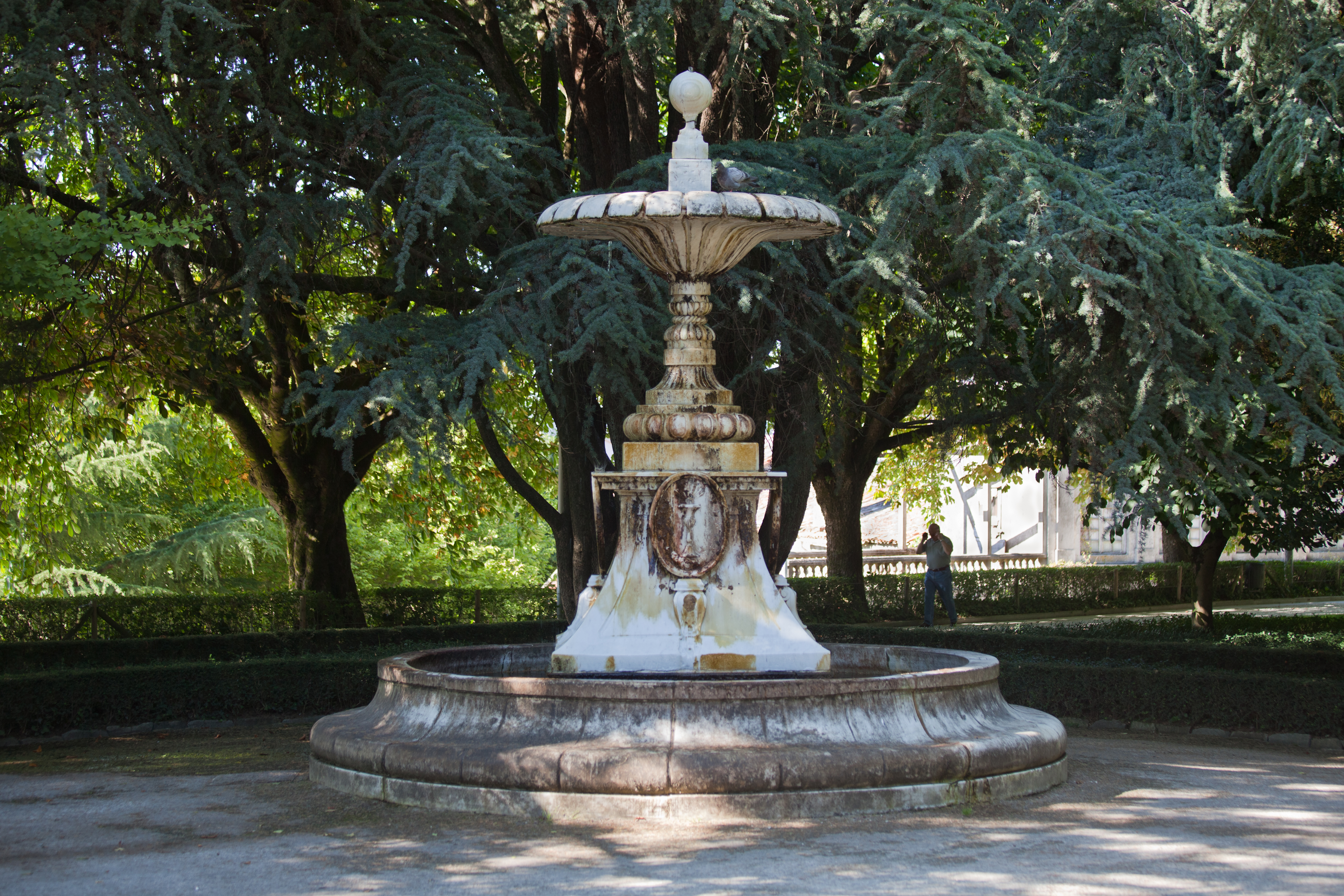 Fonte na Alameda. Santiago de Compostela, Galicia (Spain)